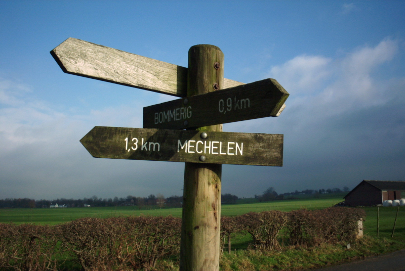 Prachtig wandelen langs de Geul bij Mechelen. Gemaakt door Gebruiker:Gdonners